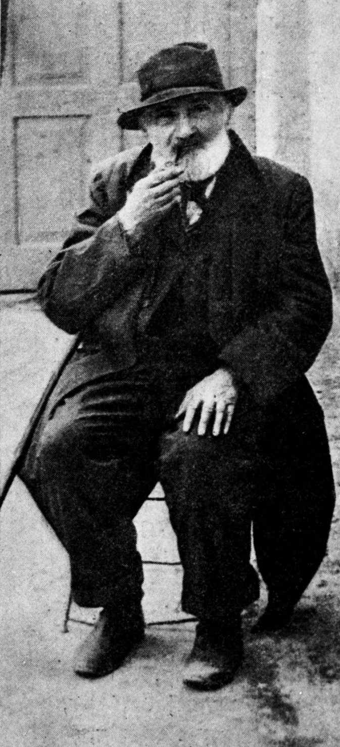 Narcyz Jankowski -polski spiskowiec,więzień Cytadeli Warszwskiej(1860),sybirak.